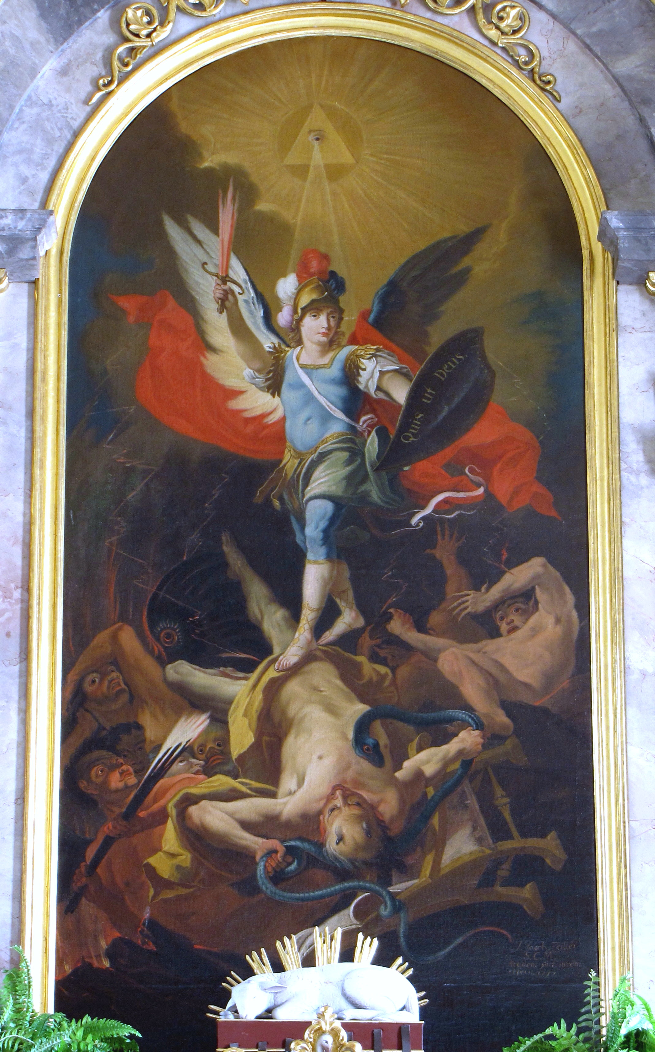 Hochaltarbild